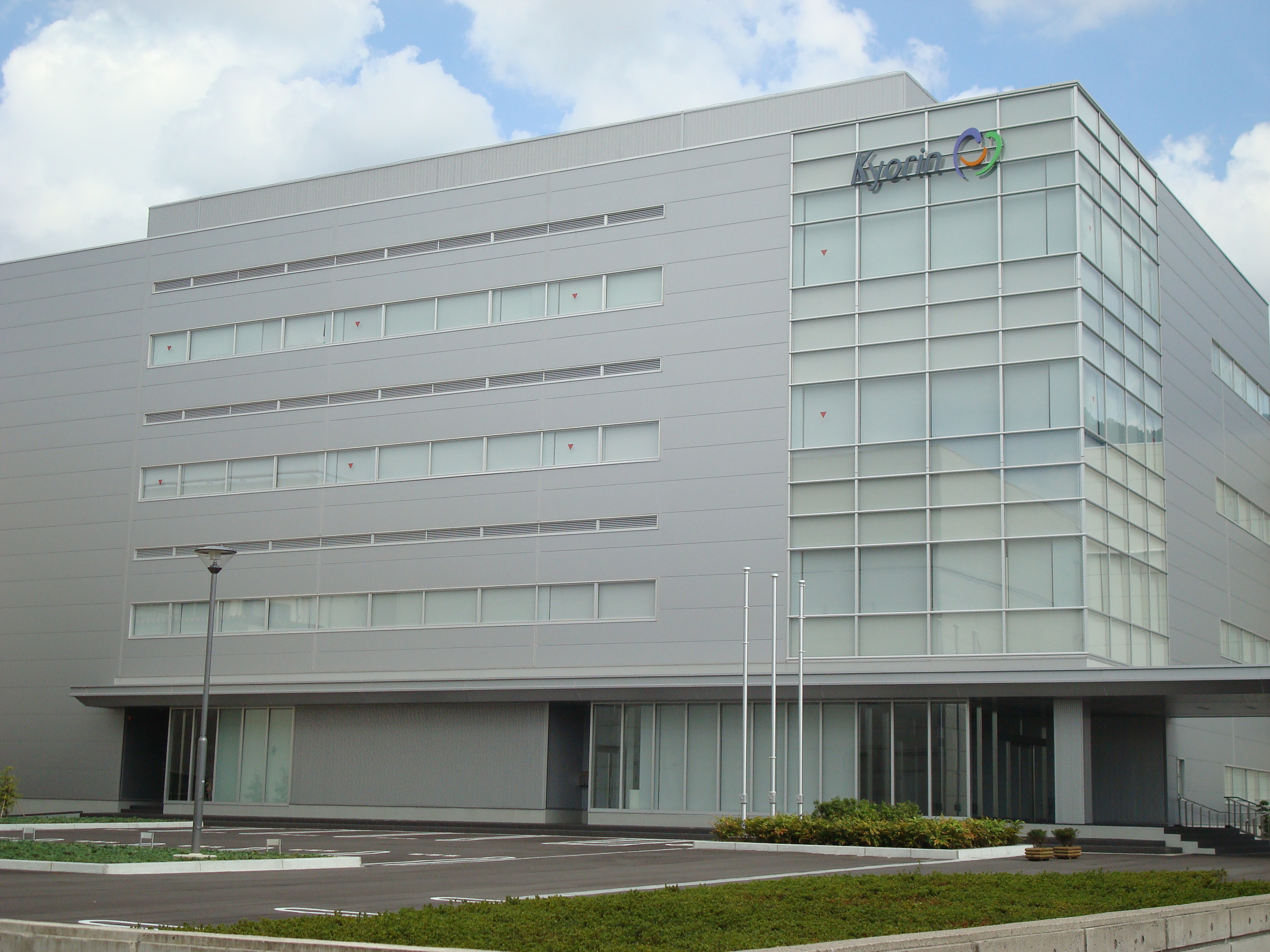 キョーリンリメディオ